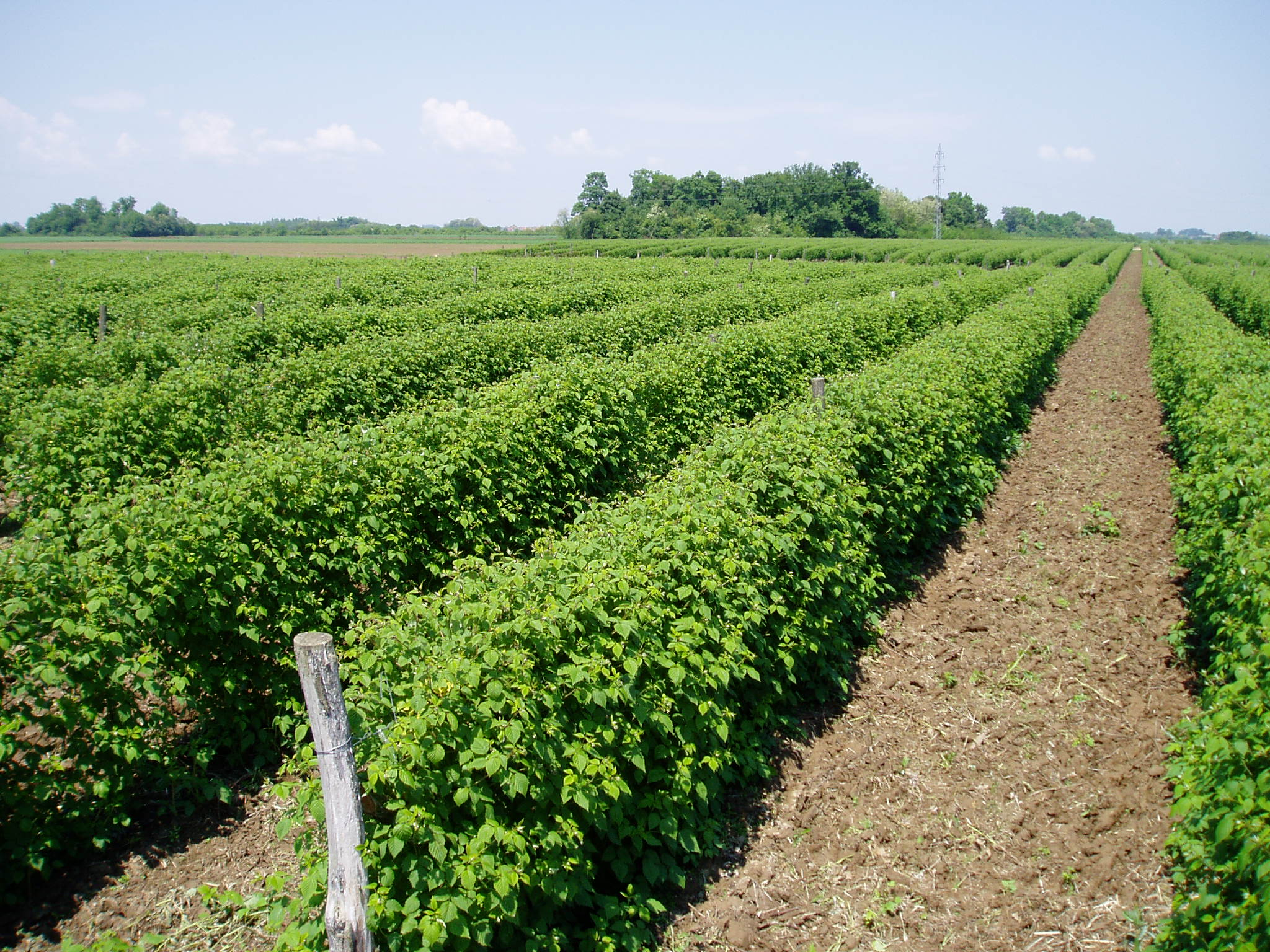 zasad miker